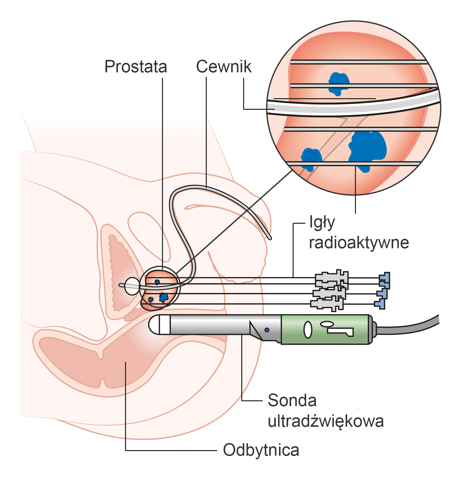 Brachyterapia o wysokiej mocy dawki.